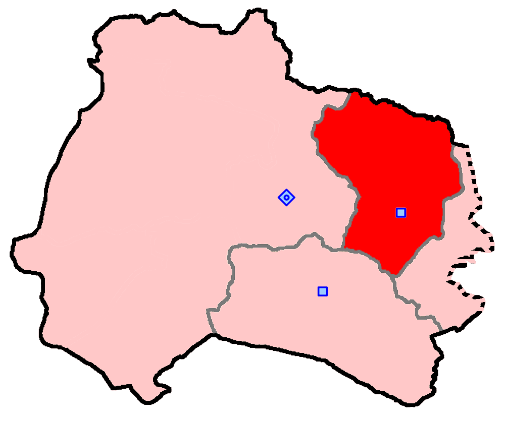 حوزهٔ انتخاباتی شیروان برای انتخابات مجلس شورای اسلامی